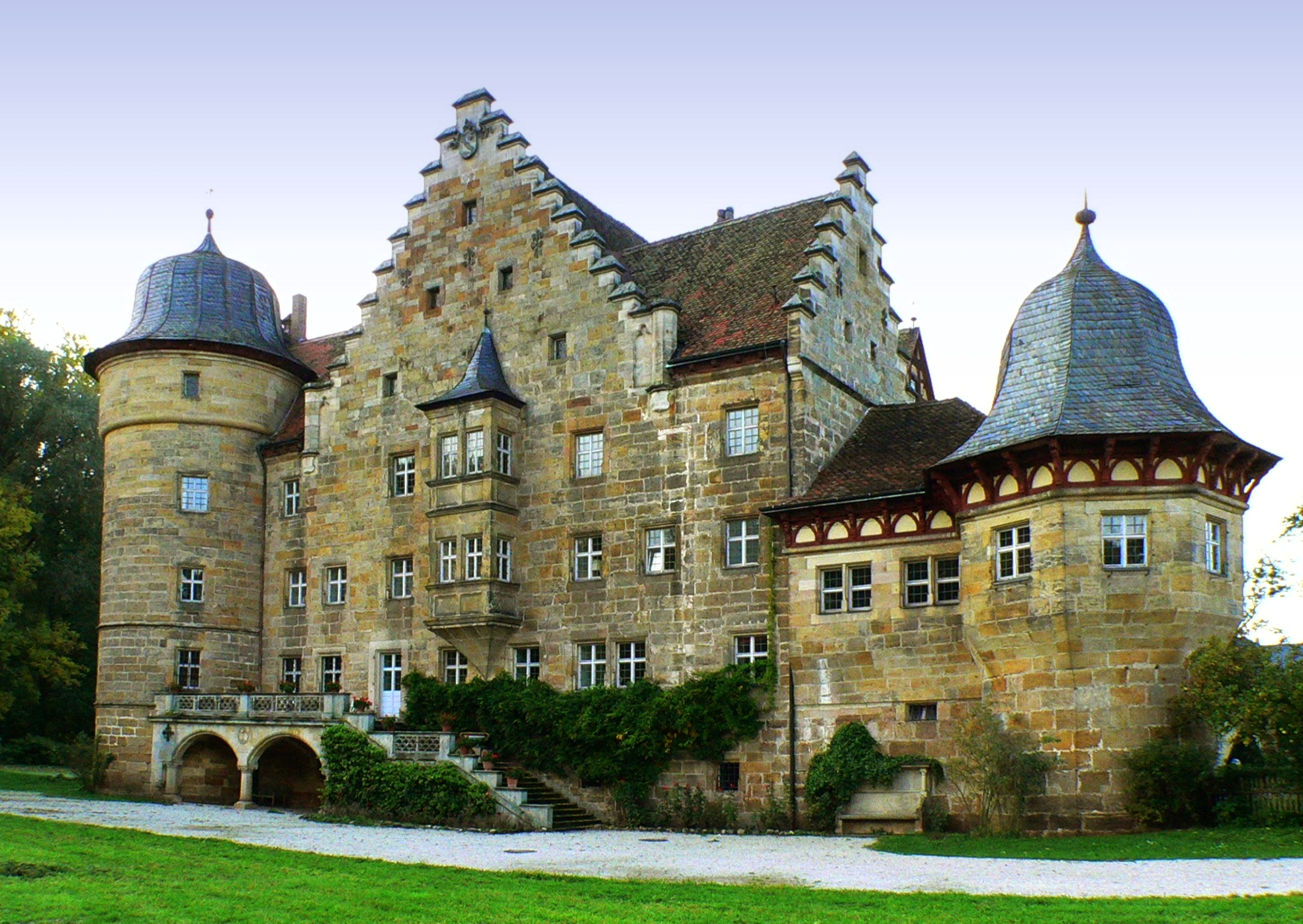 Schloss Eyrichshof bei Ebern (Bayern), Südansicht